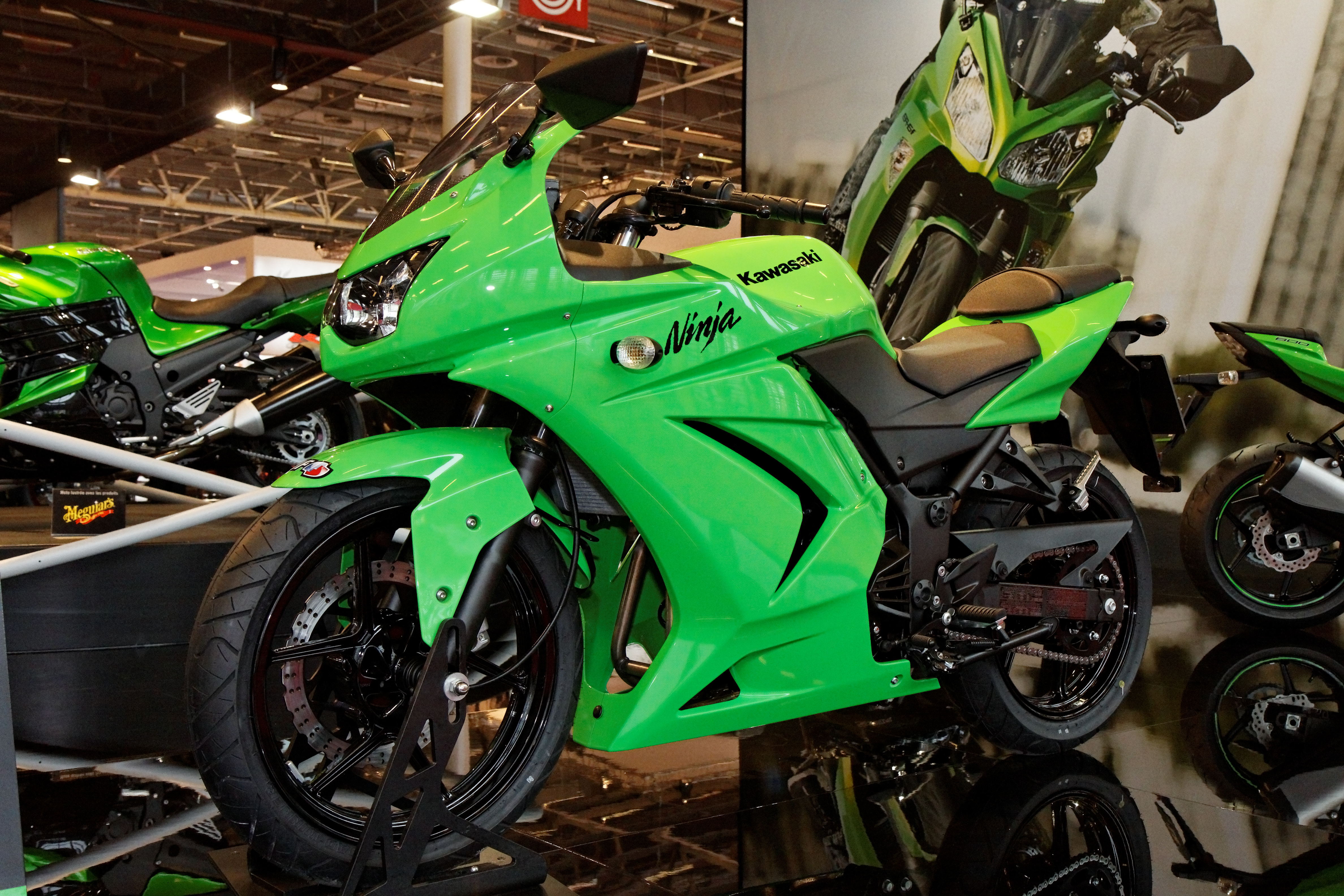 Kawasaki - Ninja 250 R